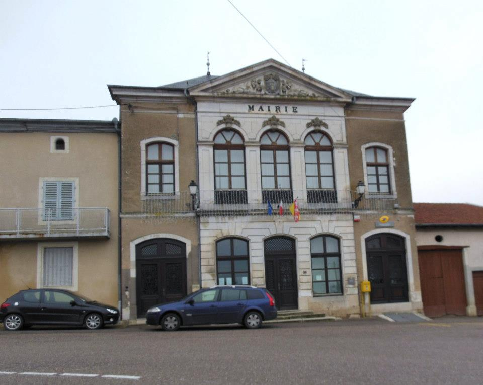 Photographie de la mairie de Boucq (54).